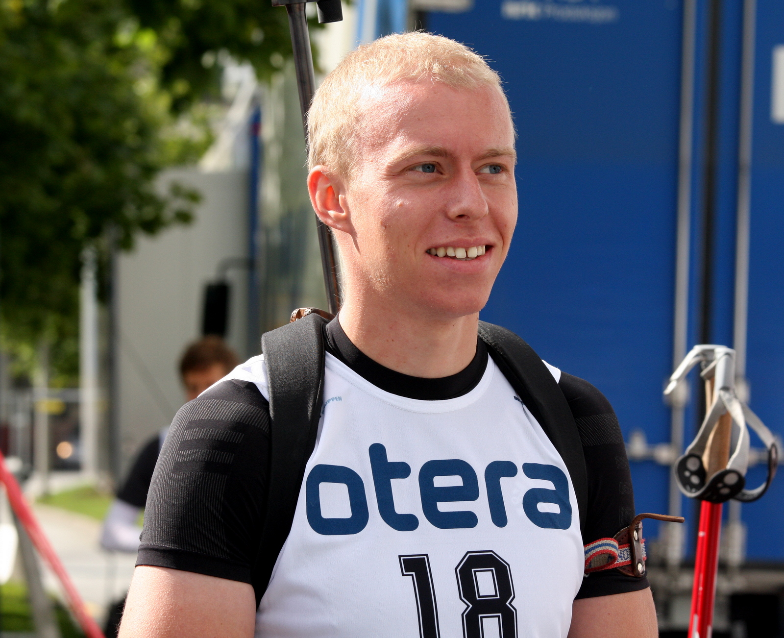 Daniel Böhm under Blinkfestivalen i Sandnes 2009